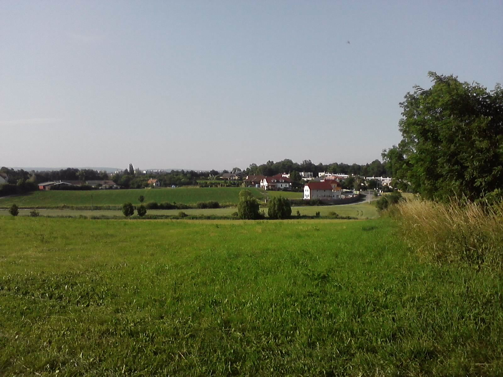 Pohled na Vodní ples